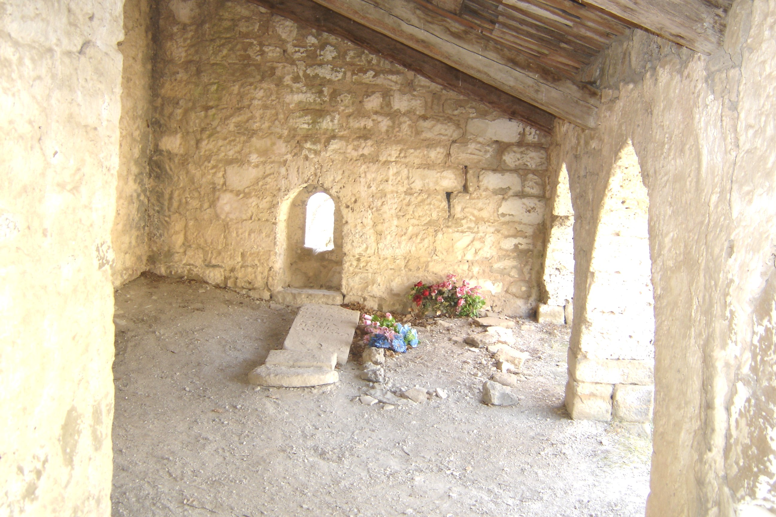 L'ermita de Sant Lleïr de Casabella, al municipi de La Coma i la Pedra, a la Vall de Lord (Solsonès). La finestra del prxo que s'obre a la façana occidental i la sepultura de l'interior del porxo